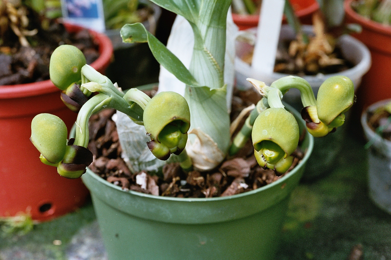 Catasetum tenebrosum female